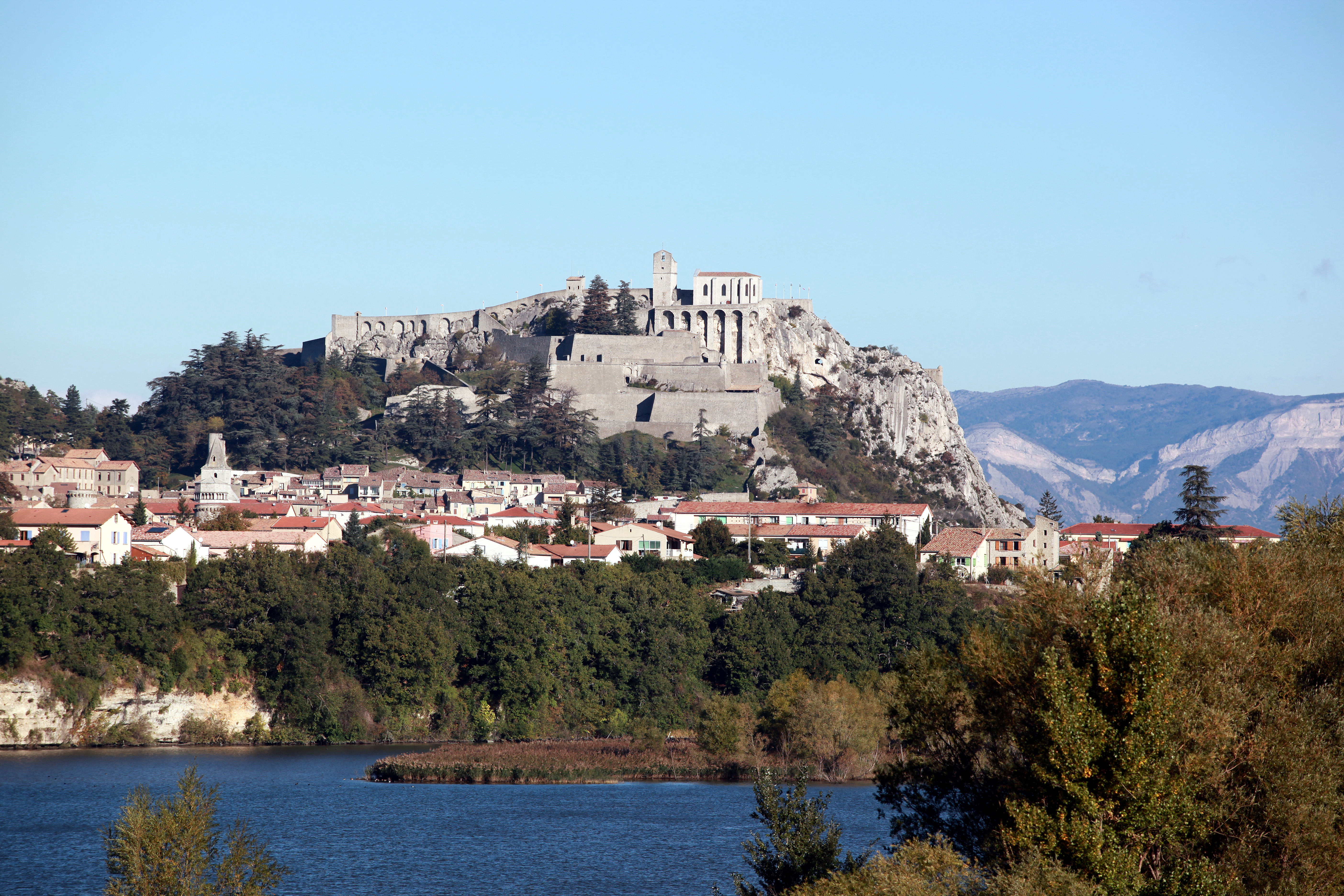 Die Zitadelle von Sisteron (Frankreich). Unten fließt die Durance.